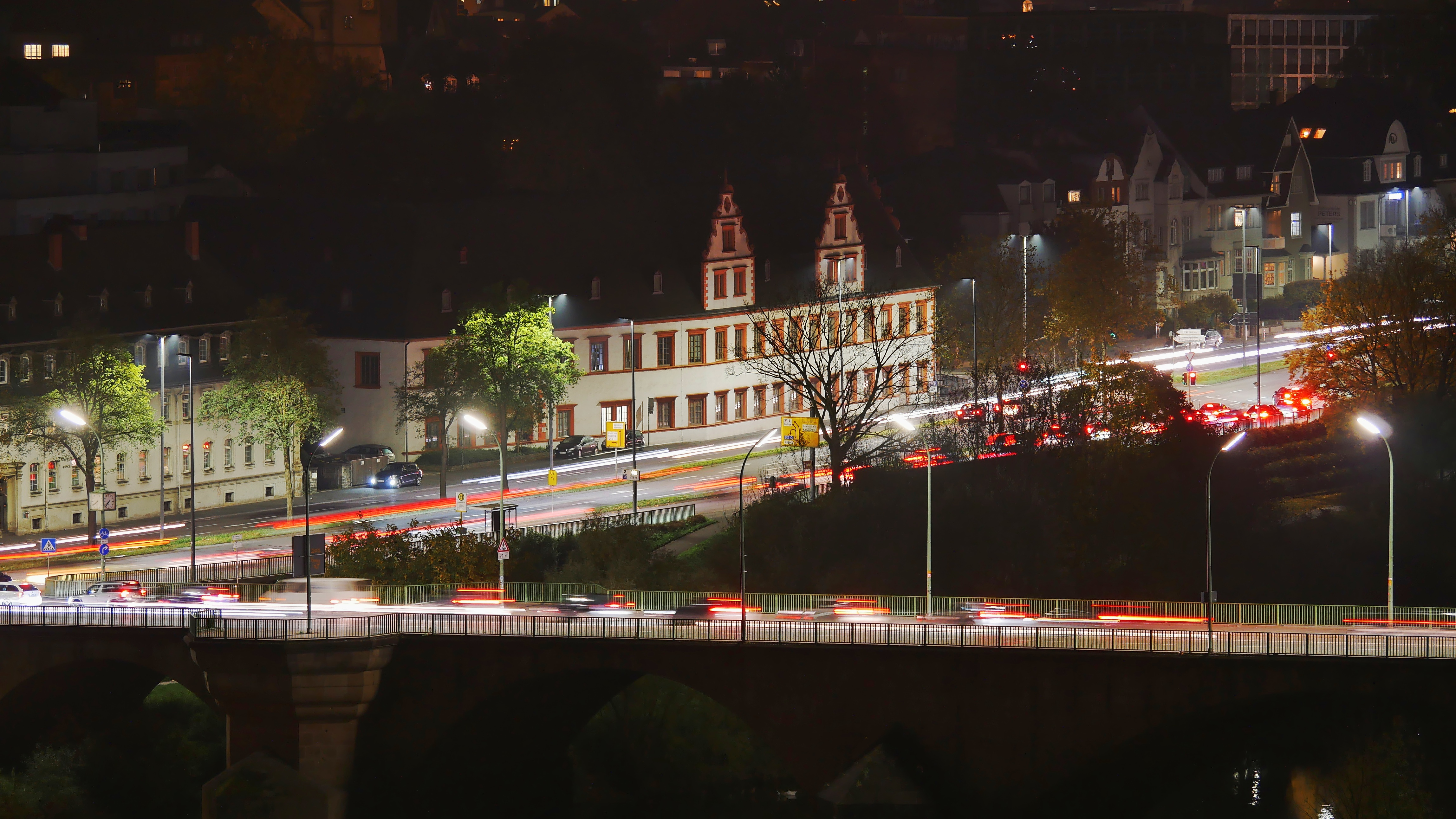 Trier: Verkehrsknotenpunkt Martinsufer - mit Studentenwohnheim Martinskloster